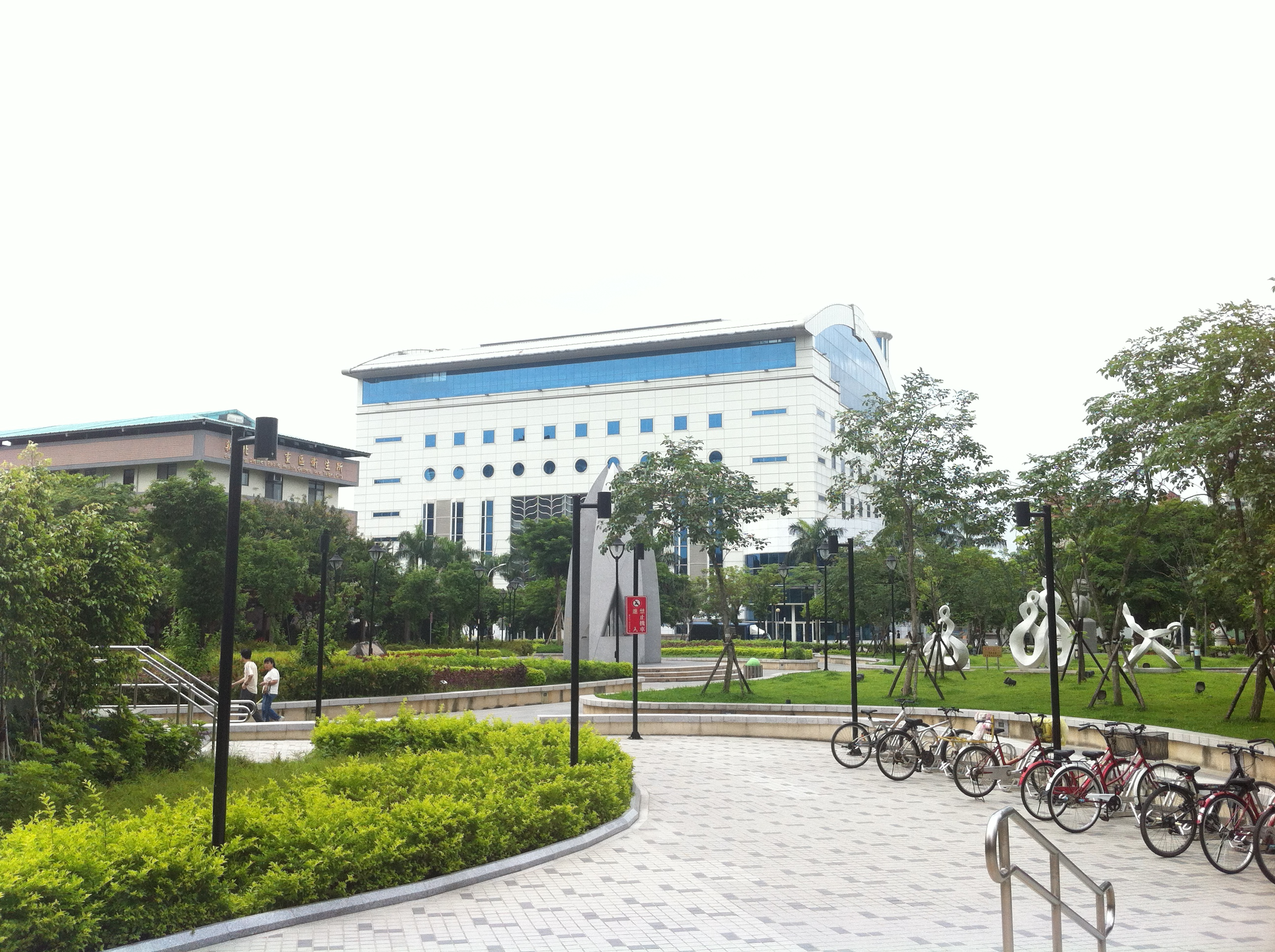 新北市三重區中山藝術公園。左方建築是新北市三重區衛生所，中央建築是新北市三重區綜合體育館。